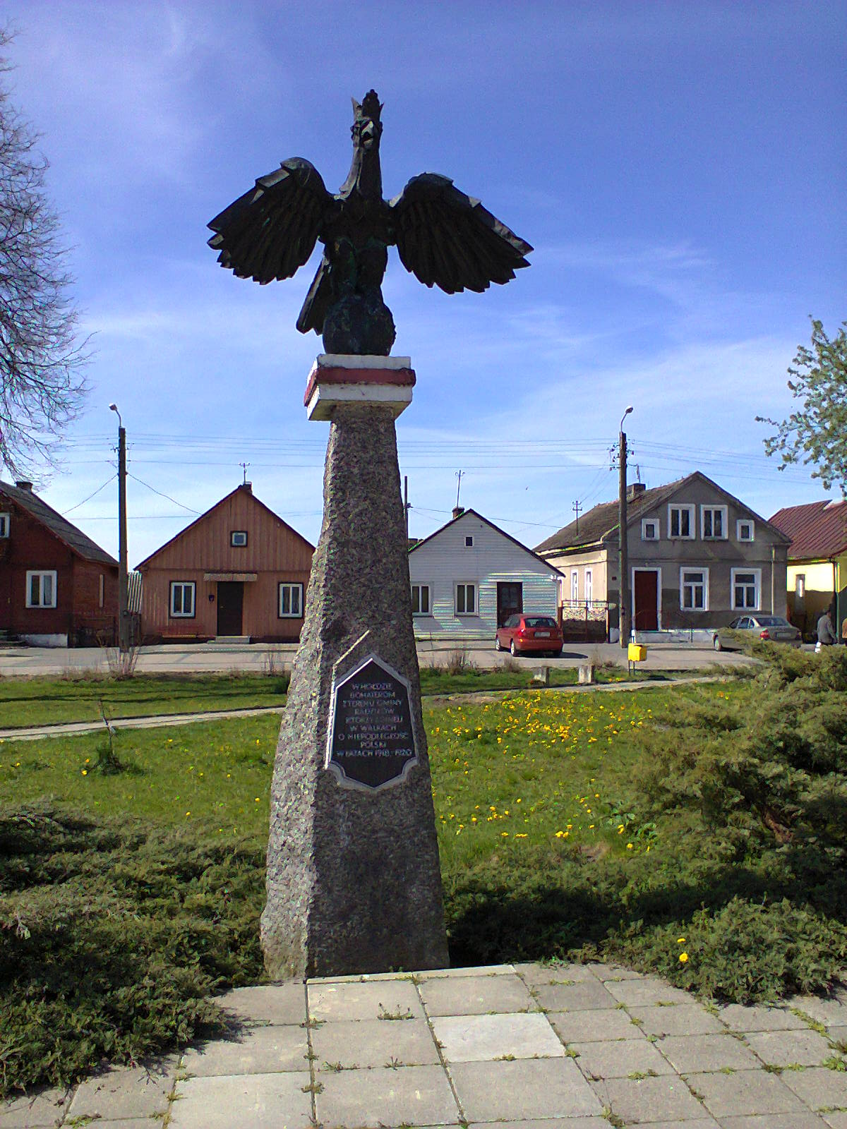 Pomnik poświęcony Bohaterom z terenu gminy Radziłów, którzy zginęli w walkach o Niepodległość Polski, w latach 1918 - 1920.